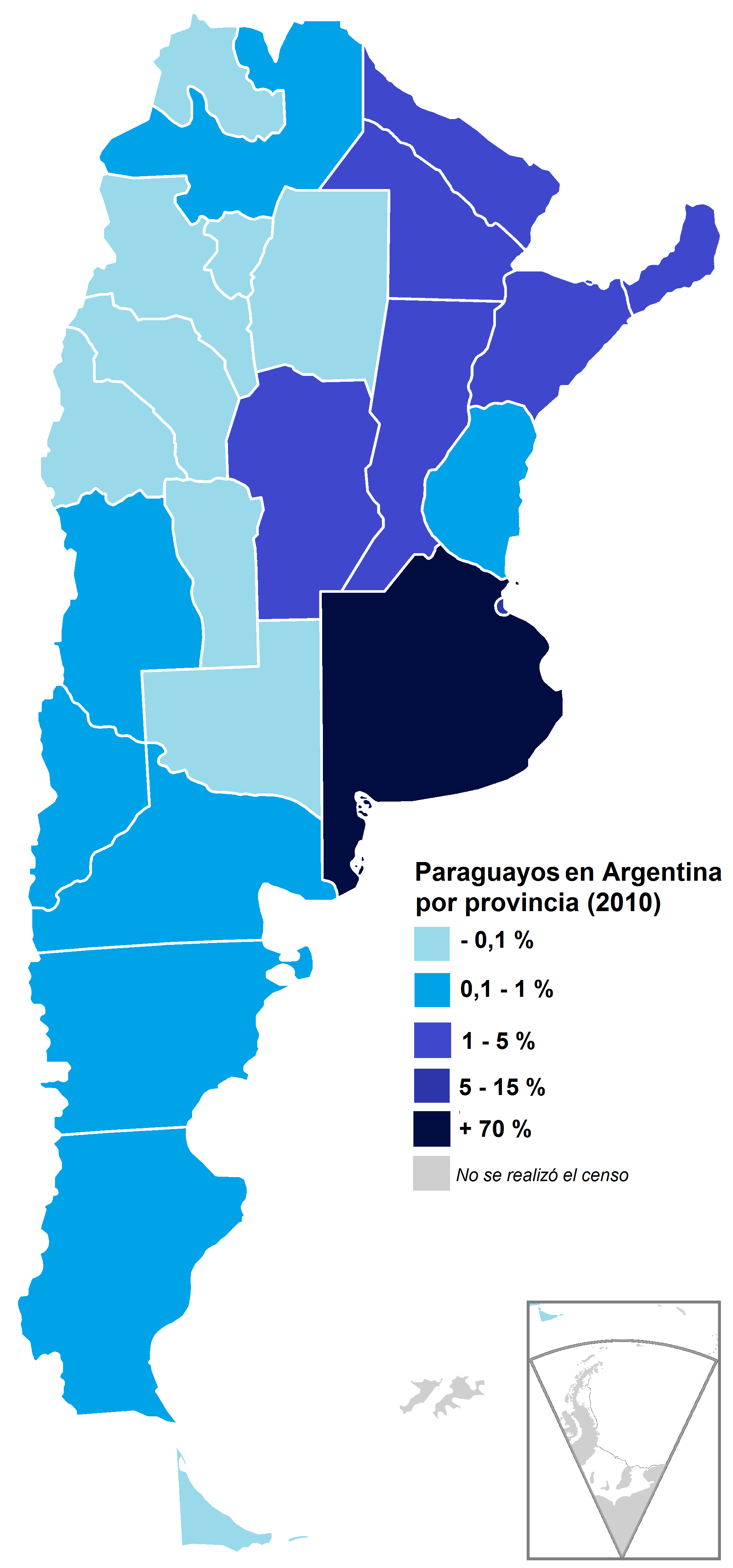 República Argentina por provincia. Población nacida en Paraguay, en porcentaje. Año 2010. Fuente: Censo 2010 - INDEC.